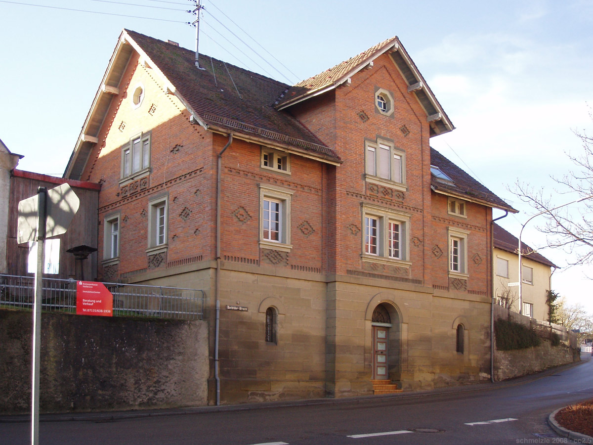 Haus Sinn, Bonfelder Str. 7, erbaut 1870 nach Plänen von Hermann Maute, Heilbronn-Biberach